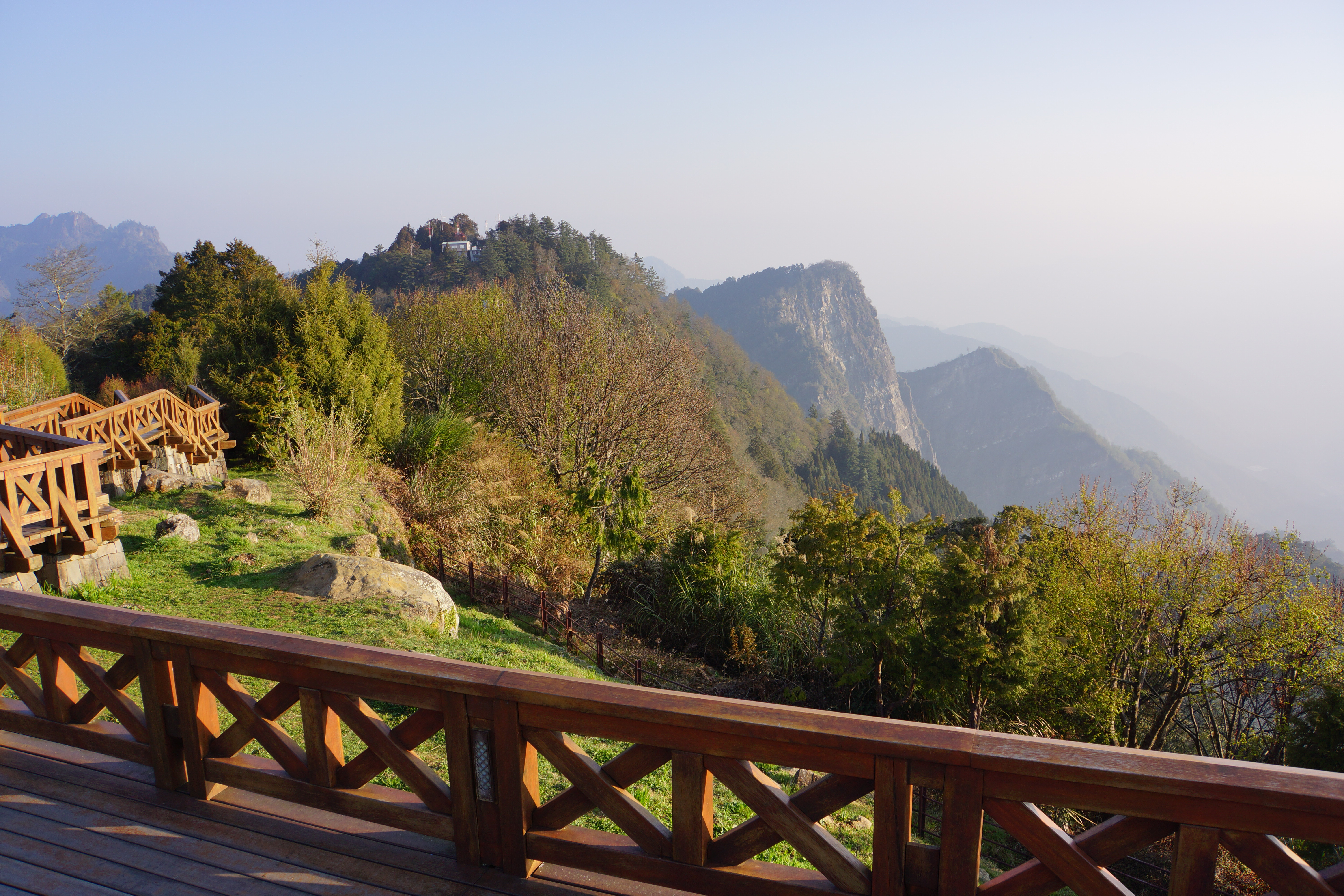 小笠原山觀景台 Mt Ogasawara Viewing Platform